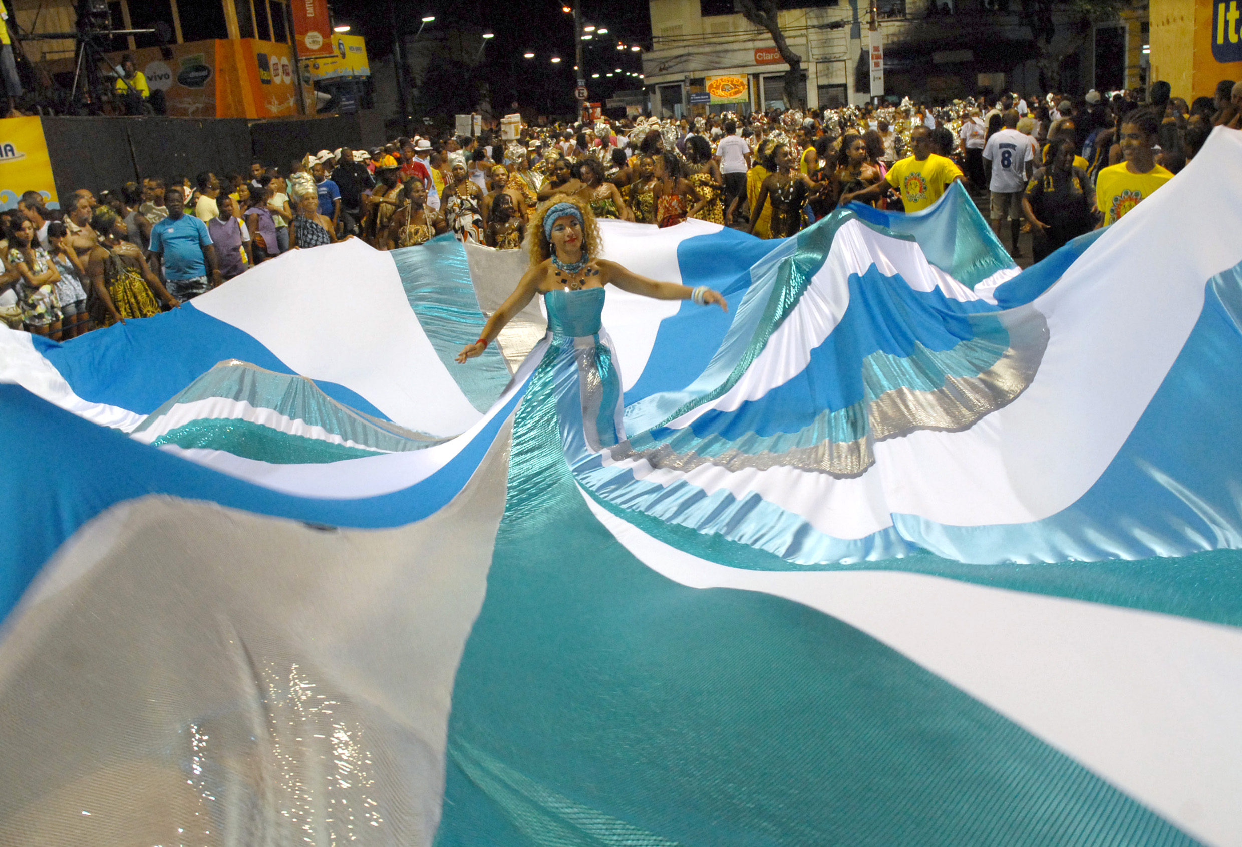 Bloco de Capoeira, Carnaval de Salvador, Bahia, Brazil